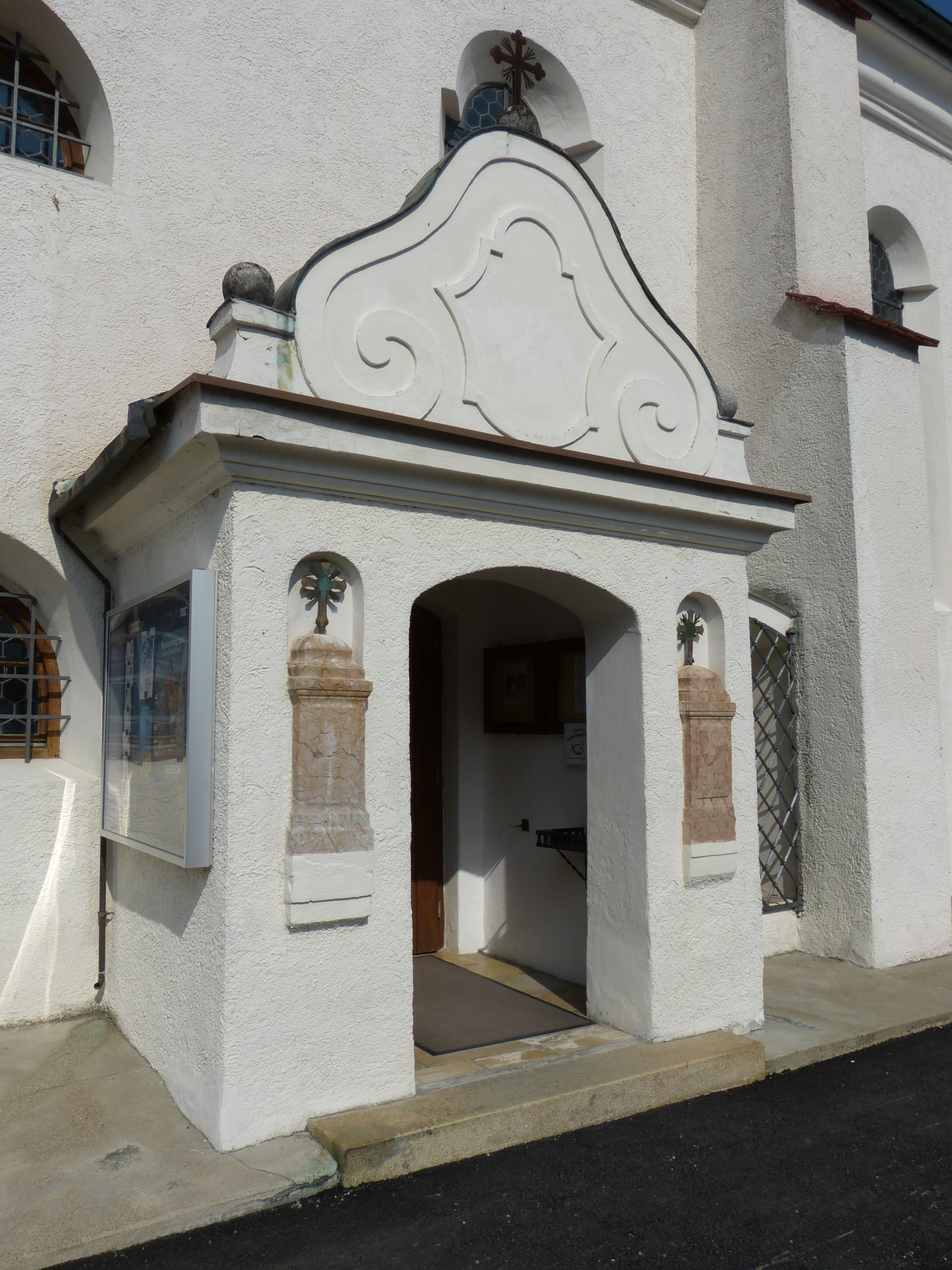 St. Georg, Niederrieden, Landkreis Unterallgäu, Bayern